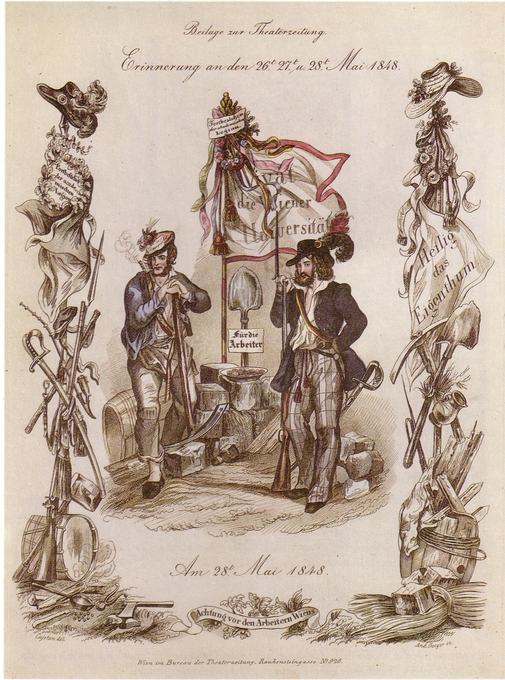 Karikatur zur Revolution von 1848/49 im Kaisertum Österreich: Arbeiter und Student der Akademischen Legion